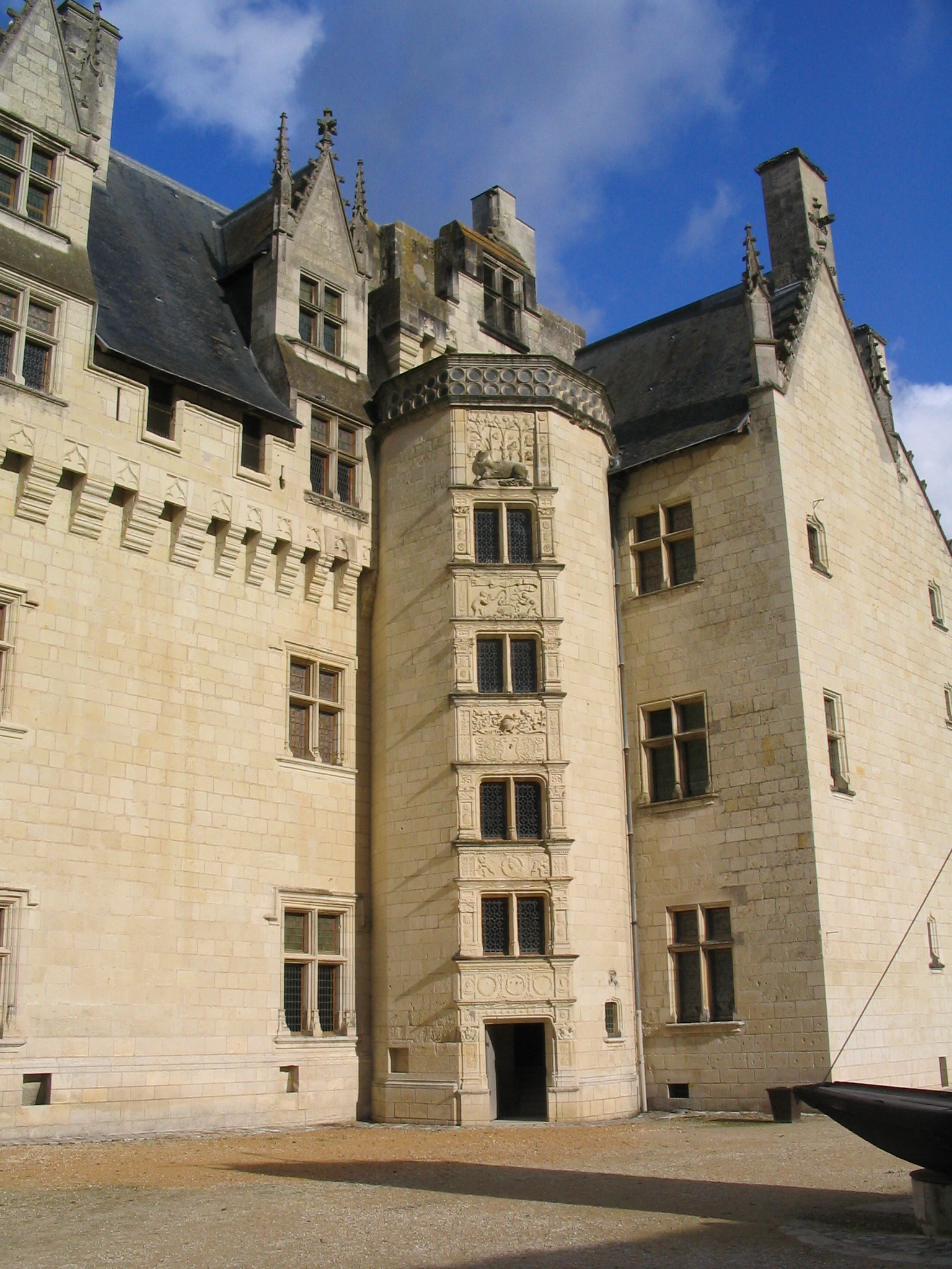 le Château Montsoreau et sa tour Renaissance This building is en partie classé, en partie inscrit au titre des Monuments Historiques. It is indexed in the Base Mérimée, a database of architectural heritage maintained by the French Ministry of Culture, under the references IA49009670 and PA00109211 .